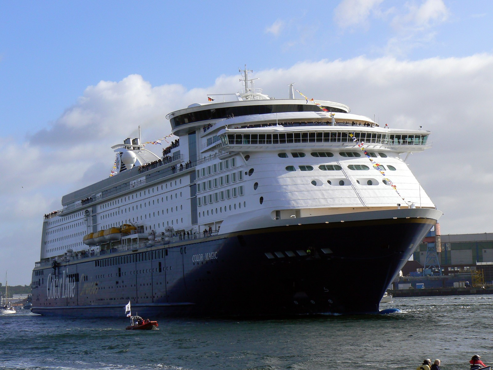 Ankunft der Kreuzfahrtfähre M/S Color Magic am Tag ihrer Taufe im Kieler Hafen.